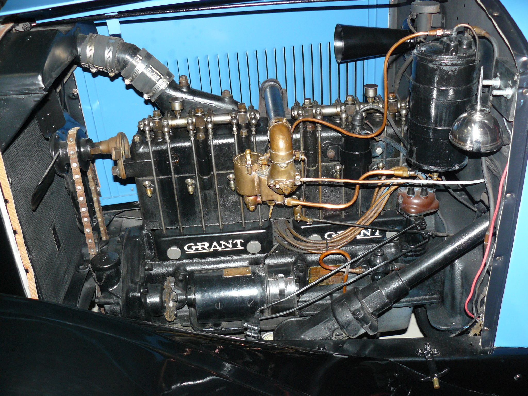 Kearney 2013